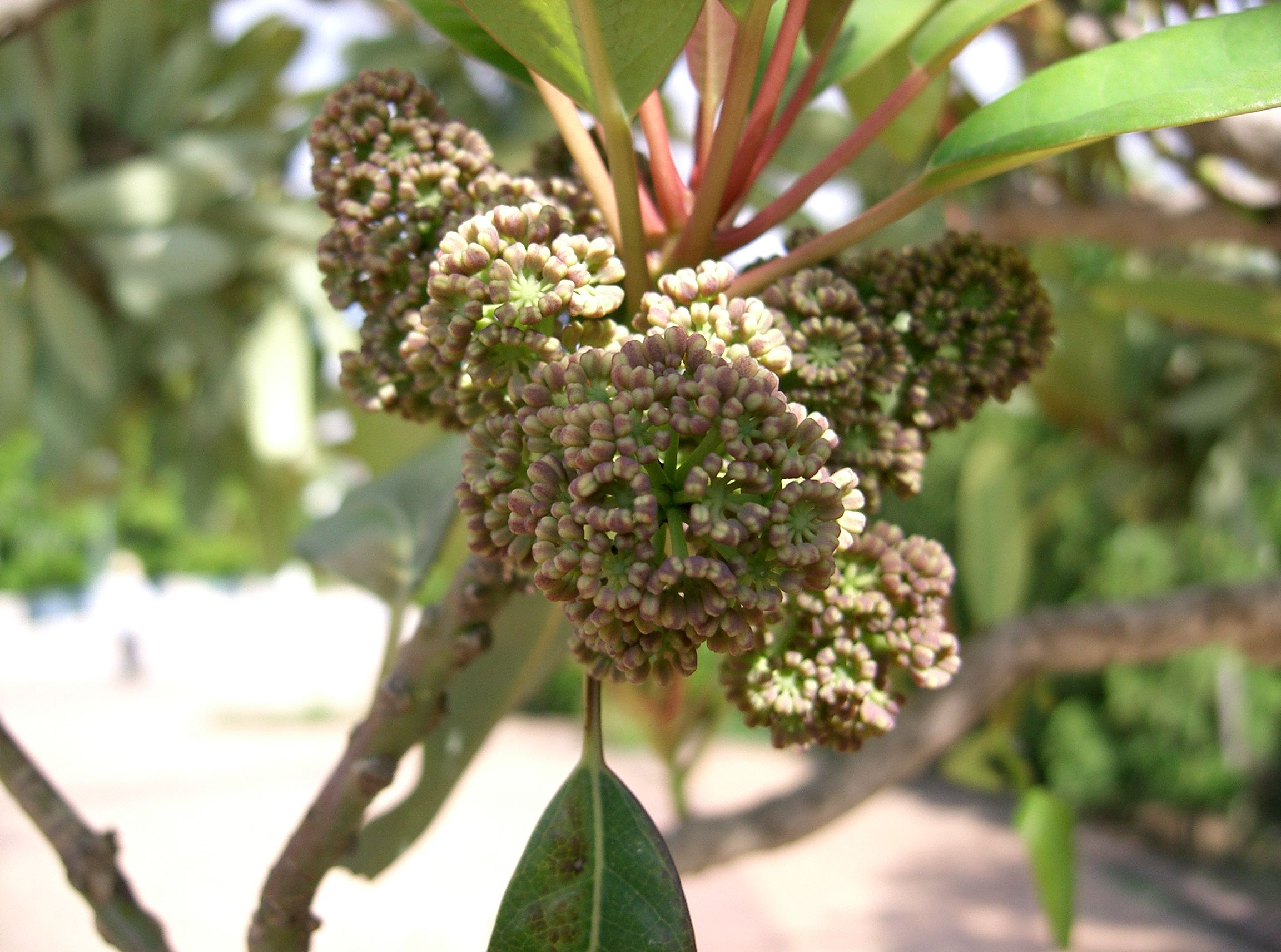 Daphniphyllum teijsmannii(=D. amamiense=D. glaucescens subsp. teijsmannii)